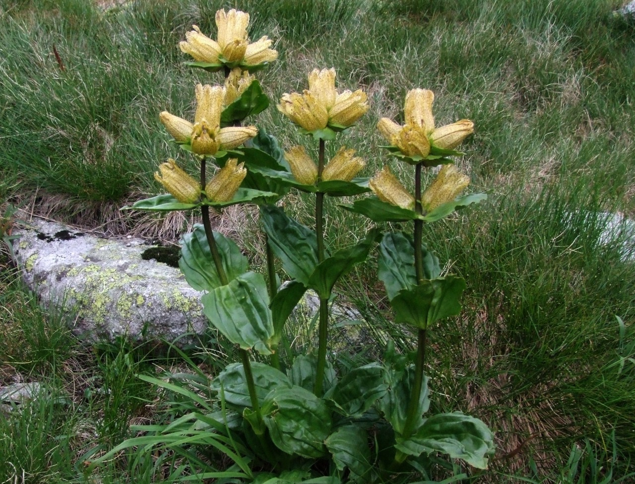 Gentiana punctata